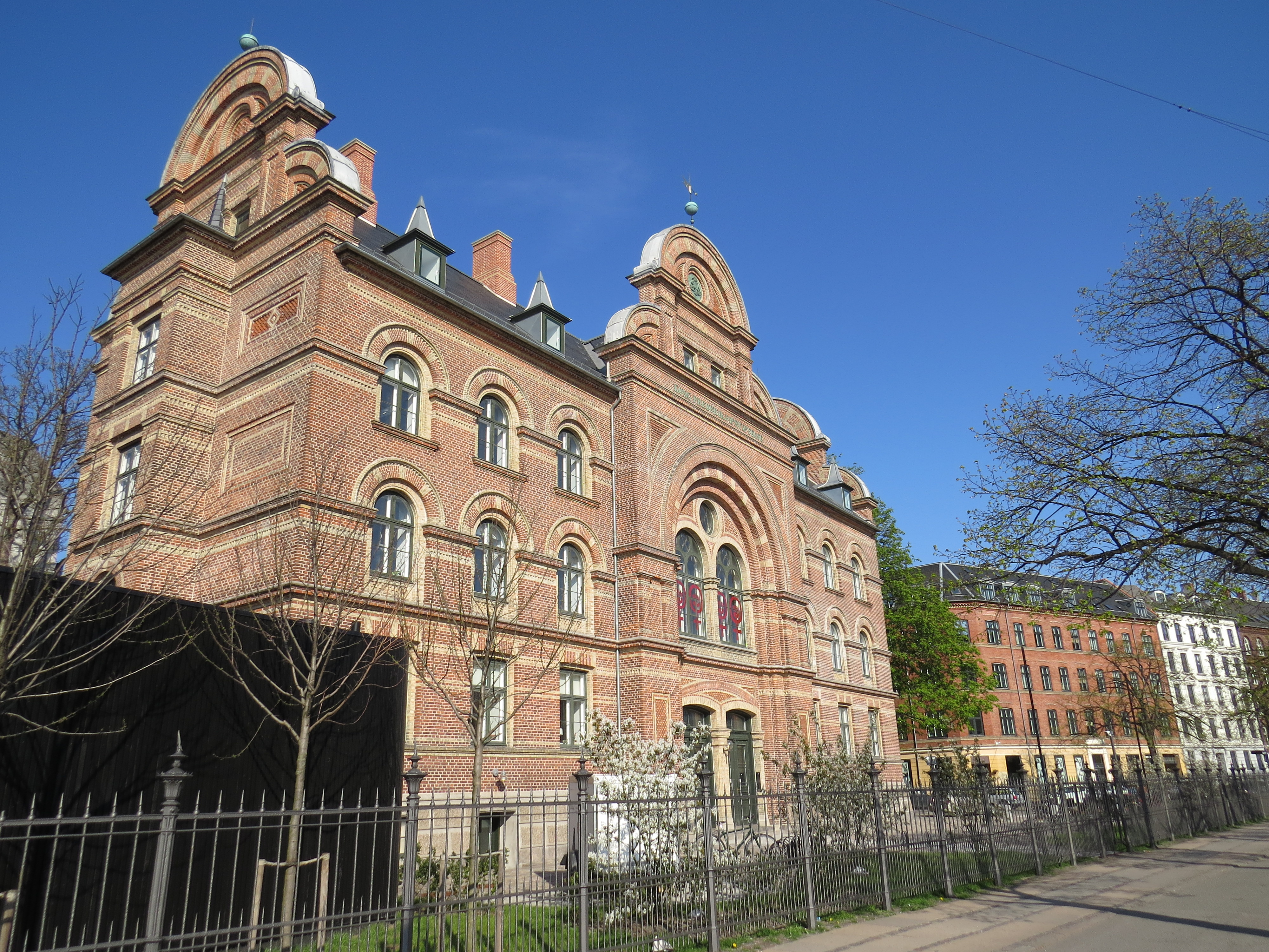 Dannerhuset, efter Grevinde Danner, født Louse Christine Rasmussen (1815-1874), København